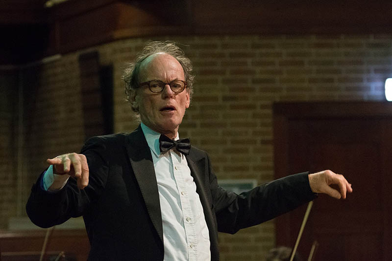 Krashna Musika Najaarsconcert Prinsekerk Rotterdam 2015